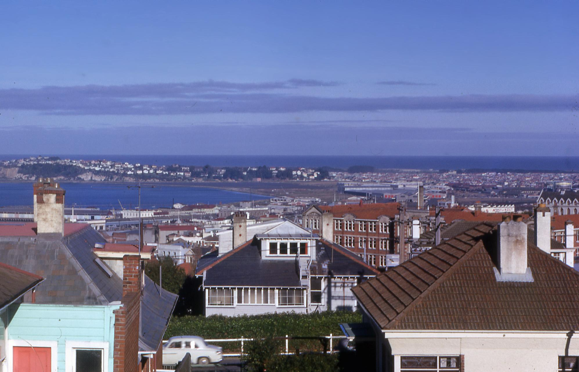 Dunedin in 1968.